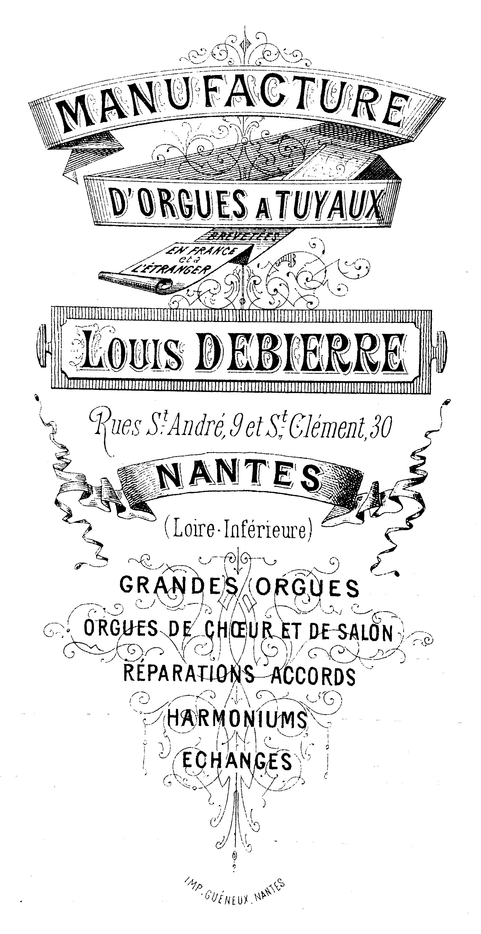 Papier à entête du facteur d'orgues de Nantes Louis Debierre, 1884. Archives nationales, travaux de restauration de la cathédrale de Vannes, F/19/7918.